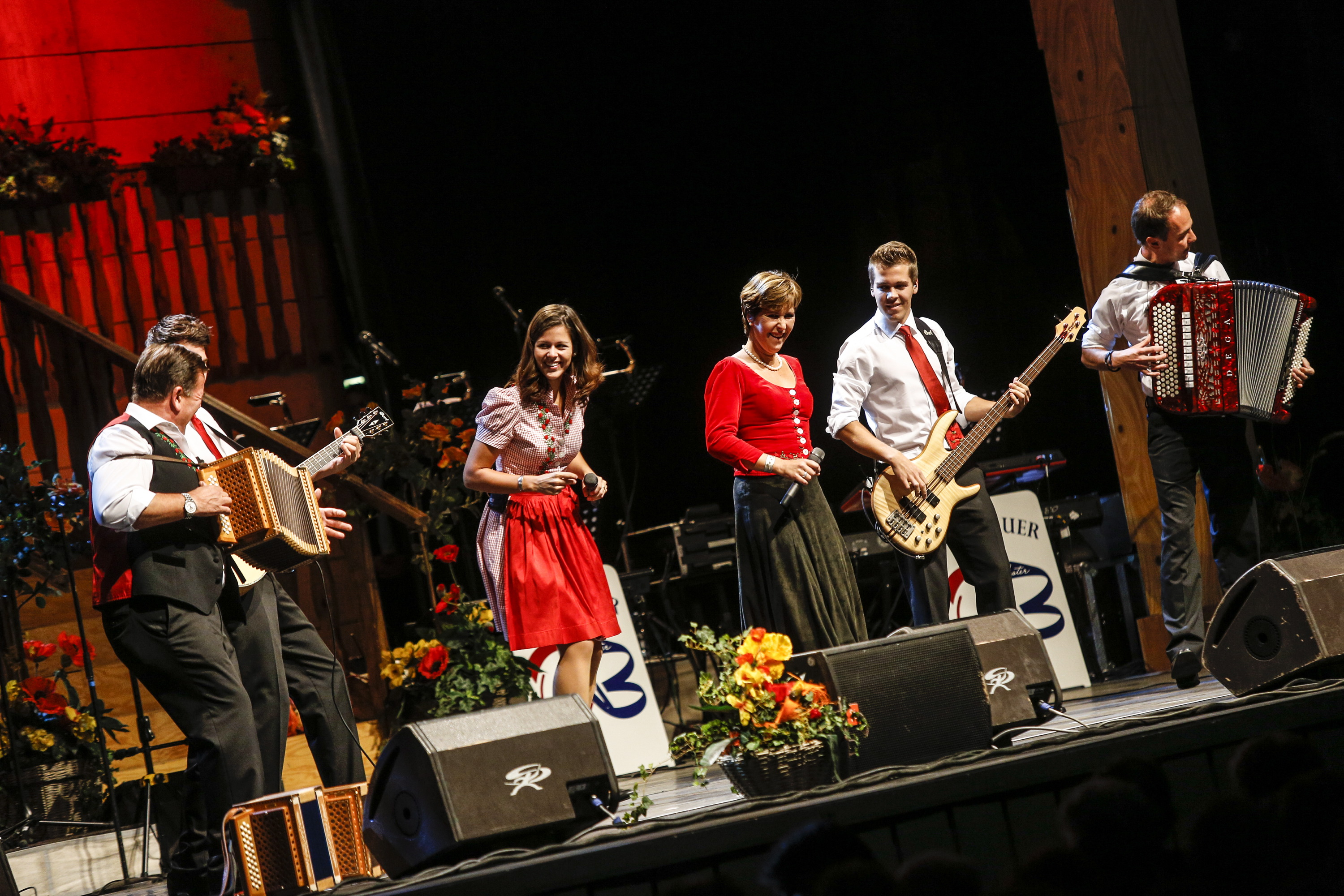 Oesch’s die Dritten bei einem Auftritt in der Jahrhunderthalle Frankfurt am Main am 18. Oktober 2013 während der Musikanenstadl-Tournee.